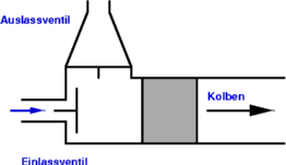 Kreiselpumpe, Ansaugen der Flüssigkeit.